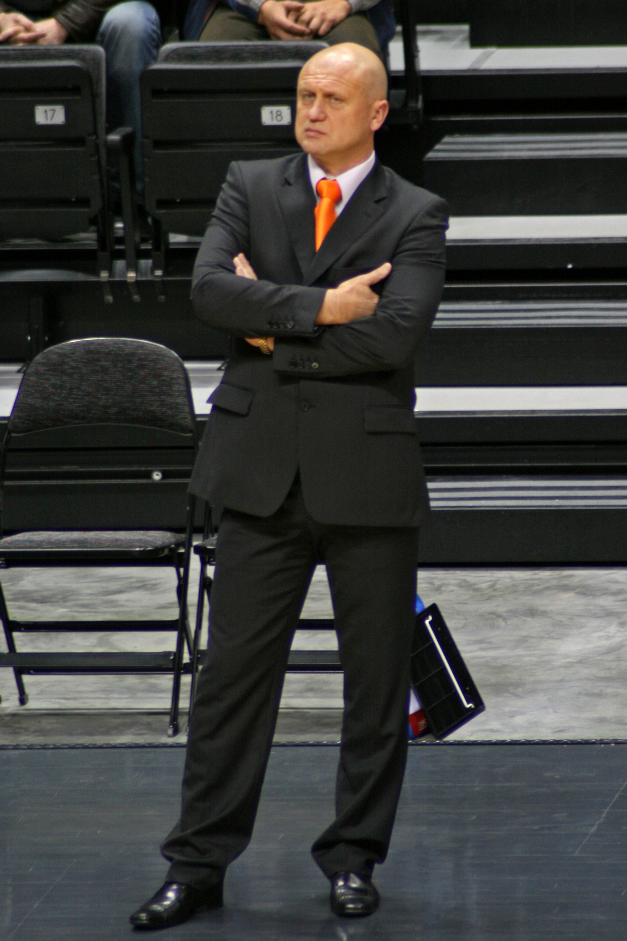 Aloyzas Rudys